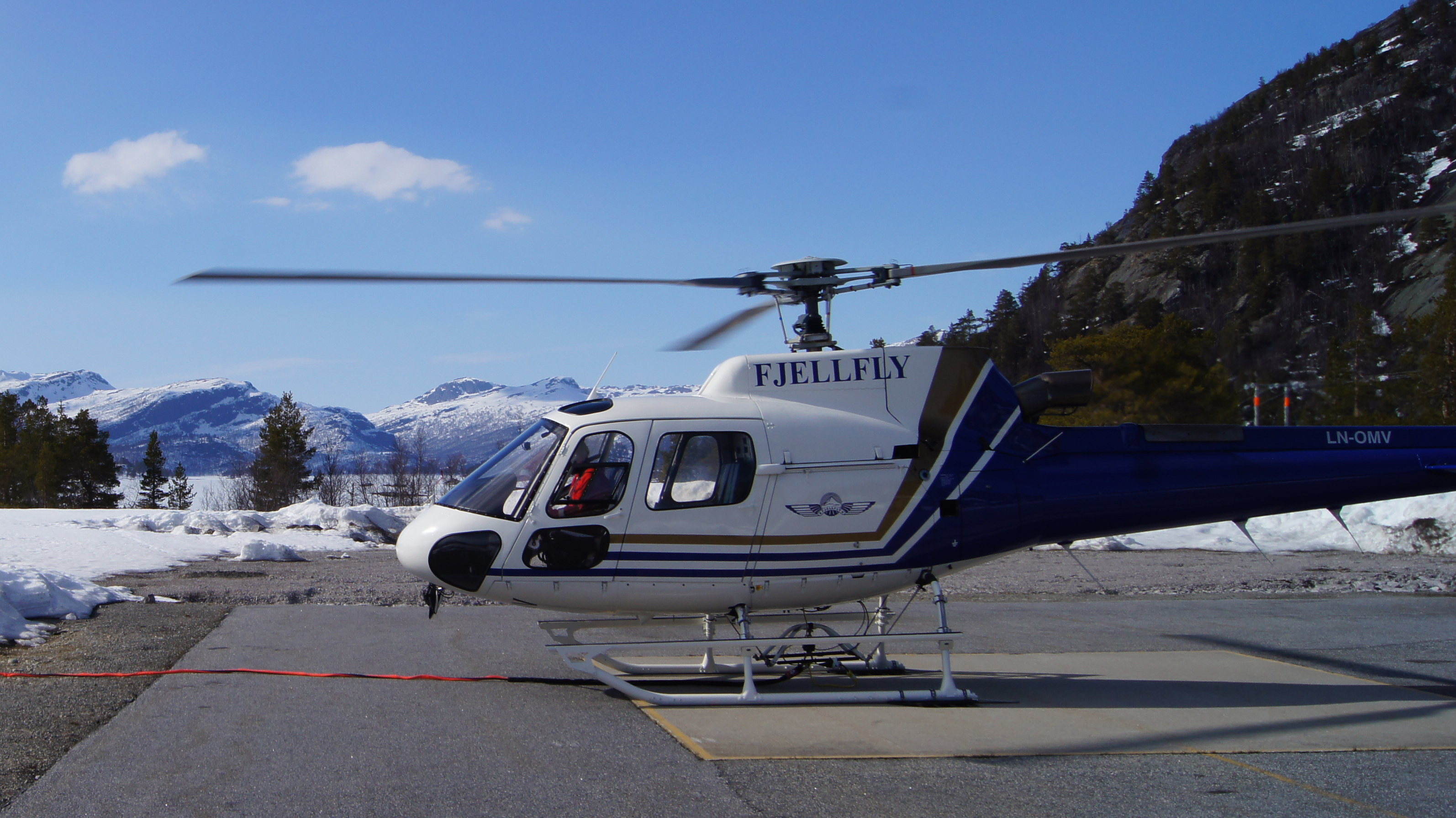 Fjellfly AS-350 B3